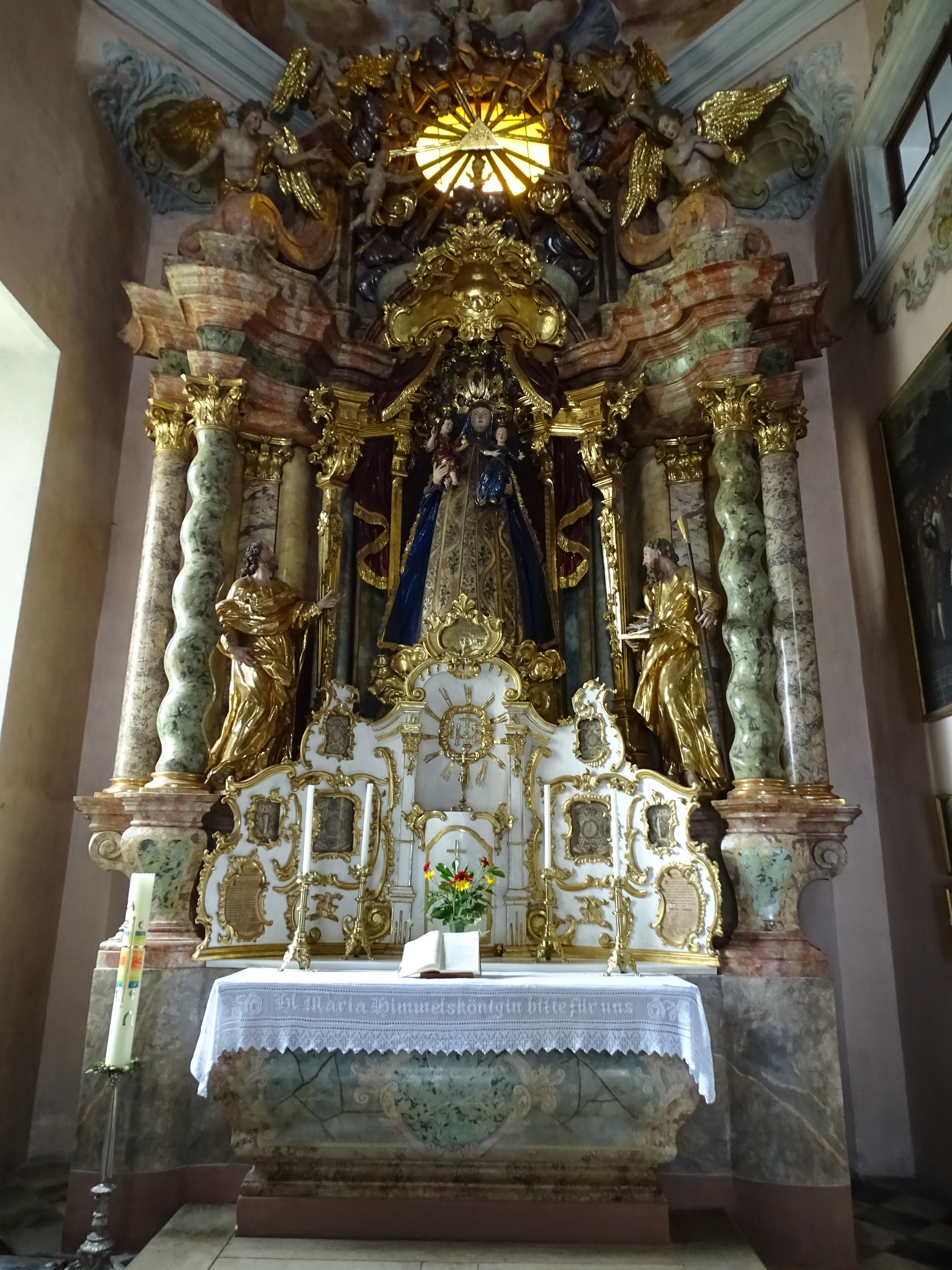 Der Altar in der Annakapelle in der Wallfahrtskirche Maria Straßengel